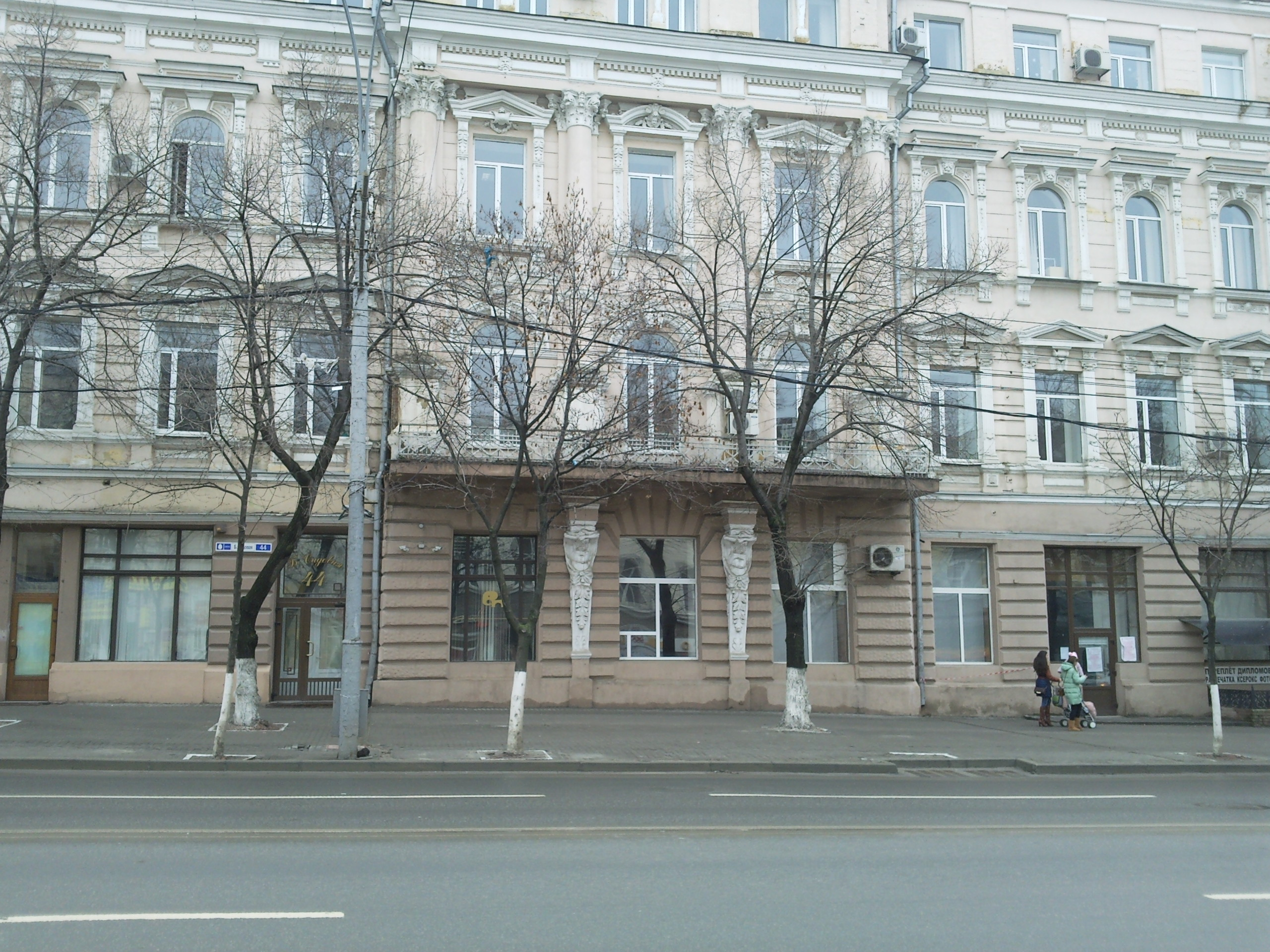 Дом с атлантами